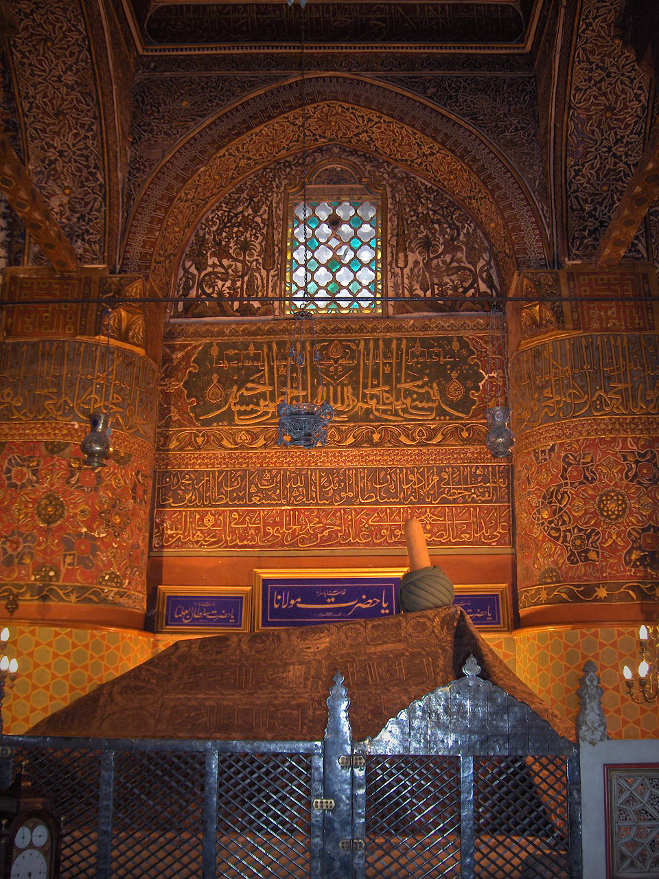 Tomb of Jalal ad-Din Muhammad Rumi; Mevlâna mausoleum; Konya, Turkey